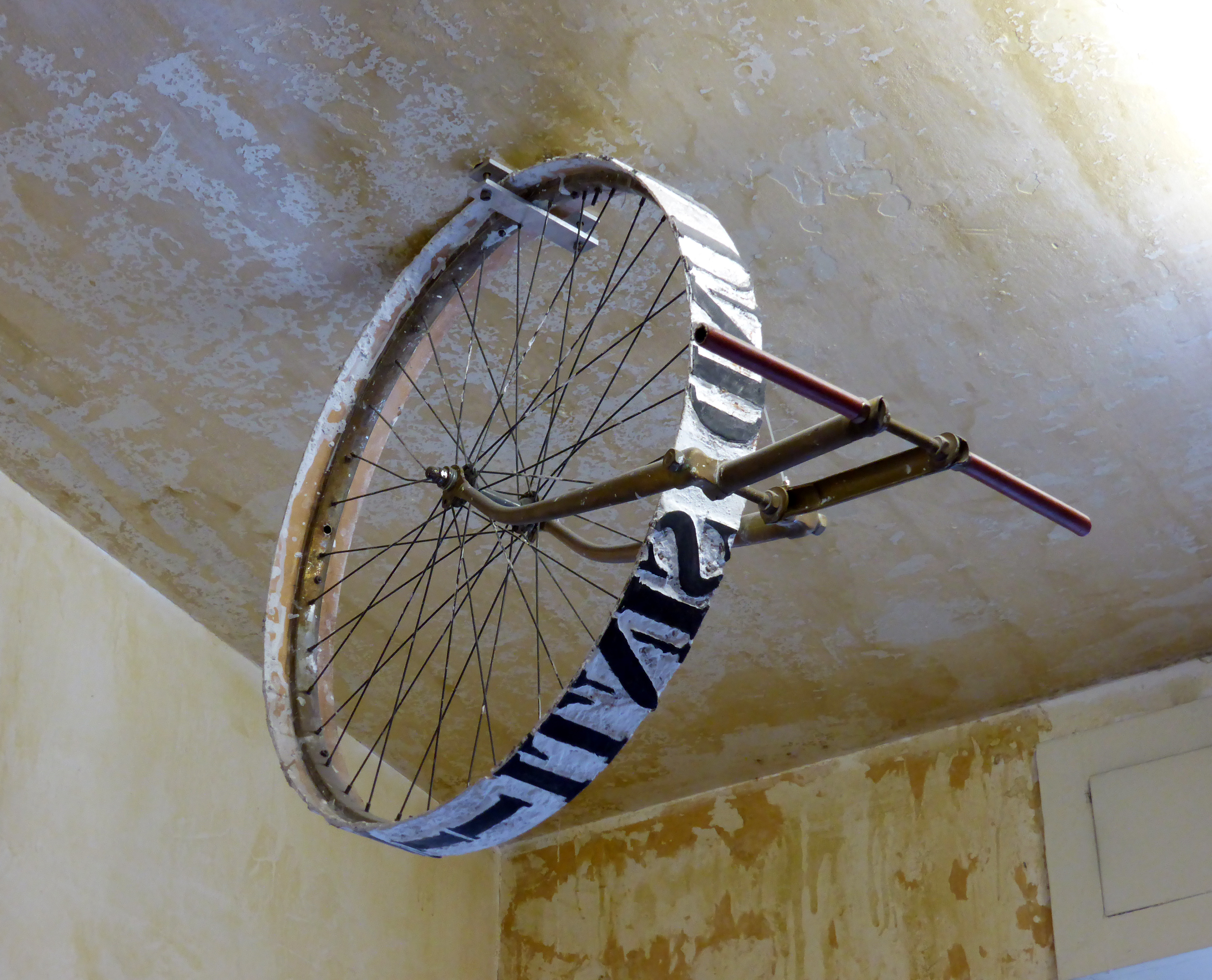 Schriftspurgerät von Gunter Demnig zum Gedenken an die Deportation im Mai 1940 der Kölner Sinti und Roma... "Eine Spur durch`s Vergessen"